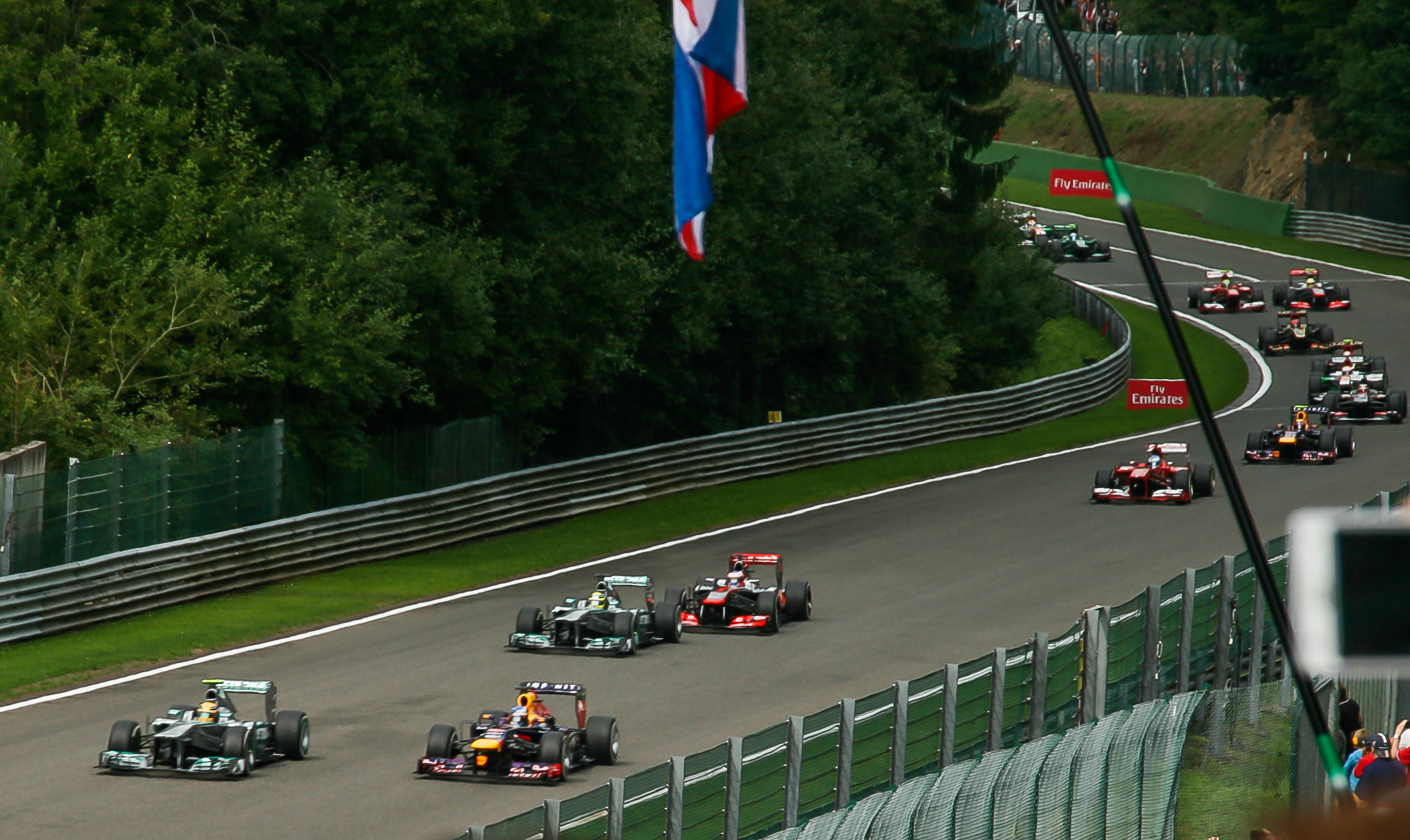 Erste Runde des Belgien Grand Prix 2013, ausgangs Eau Rouge